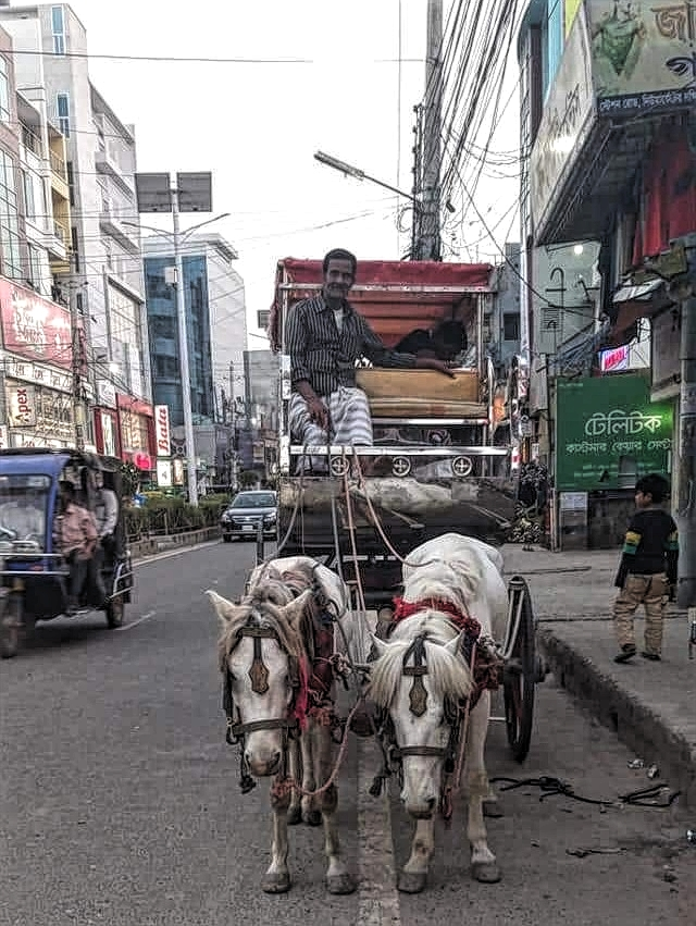 Kereta Kuda di Kota Rajshahi